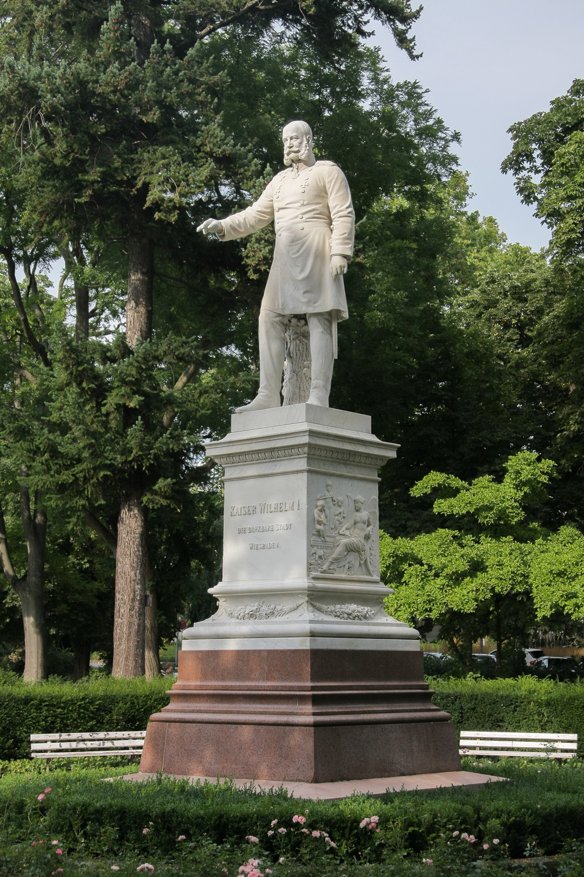 Standbild Kaiser Wilhelm I. in den Kuranlagen „Am Warmen Damm“ Wiesbaden, aus carrarischem Marmor von Bildhauer Johannes Schilling, enthüllt am 16. Oktober 1894 This is a photograph of an architectural monument.